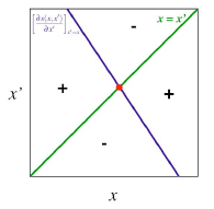 Graphique PIP basique